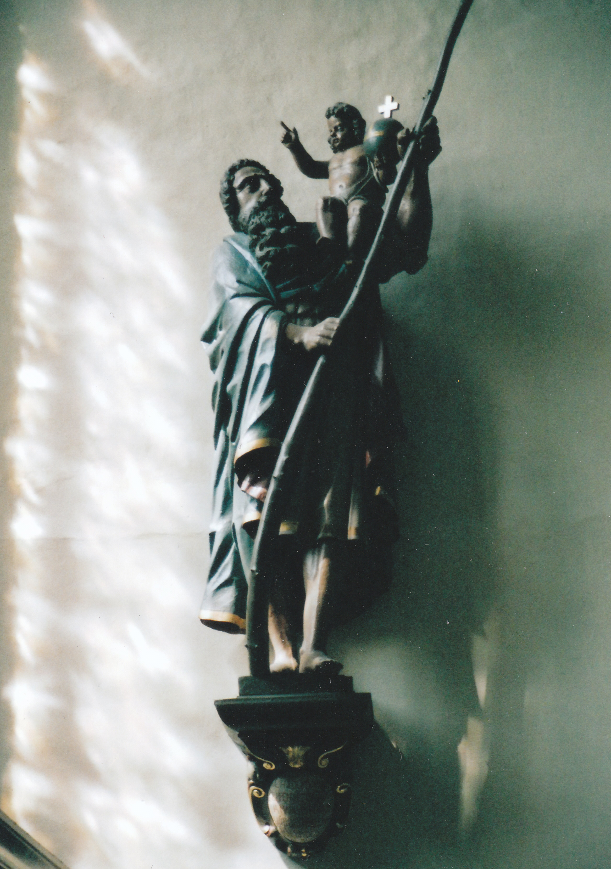 St. Johannes Baptist (Attendorn): St. Christophorus aus der Werkstatt von Johannes Sasse aus der 2. Hälfte des 17. Jahrhunderts, gestiftet 1680